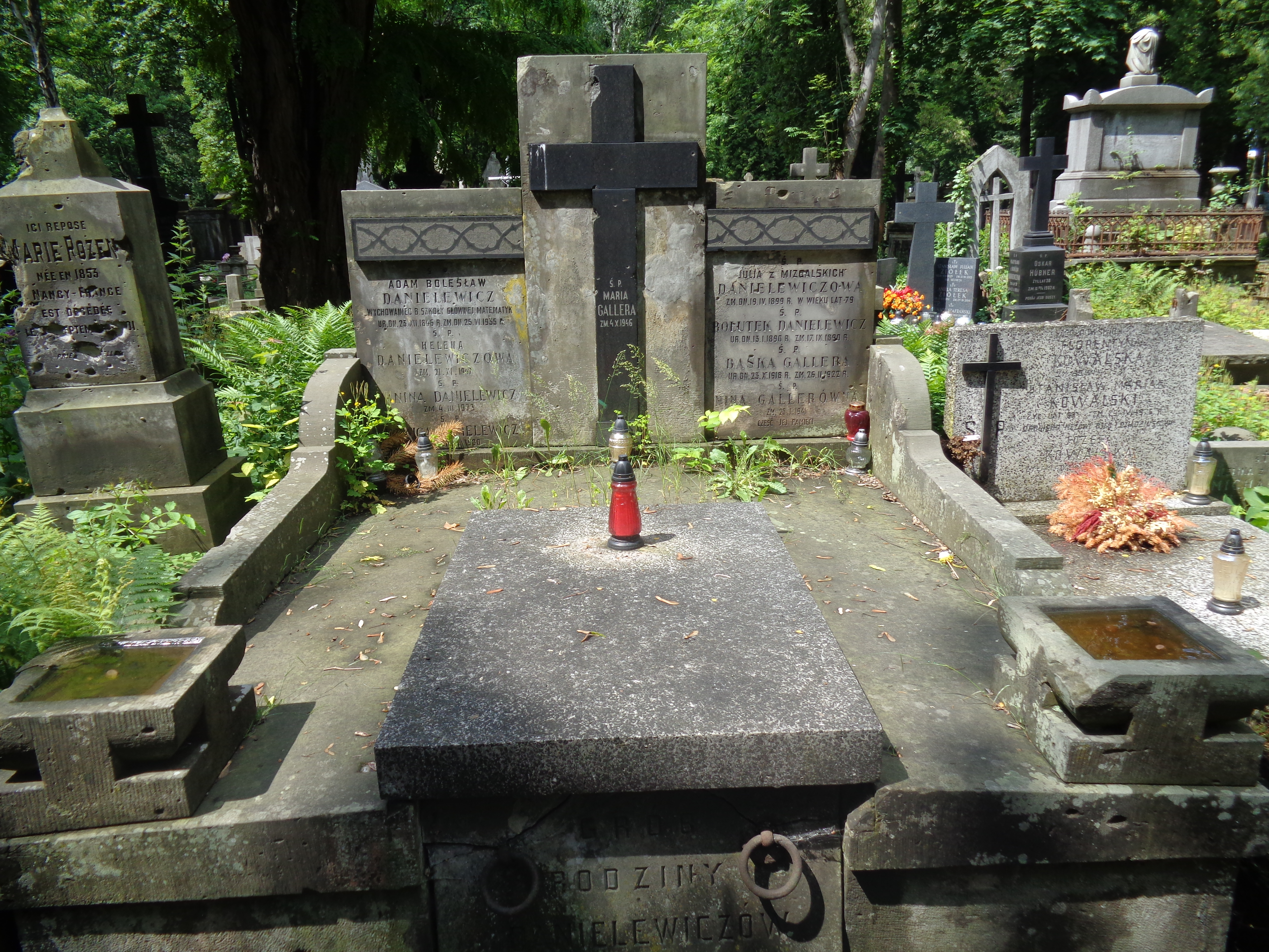 Grób Adama Danielewicza na Cmentarzu Powązkowskim